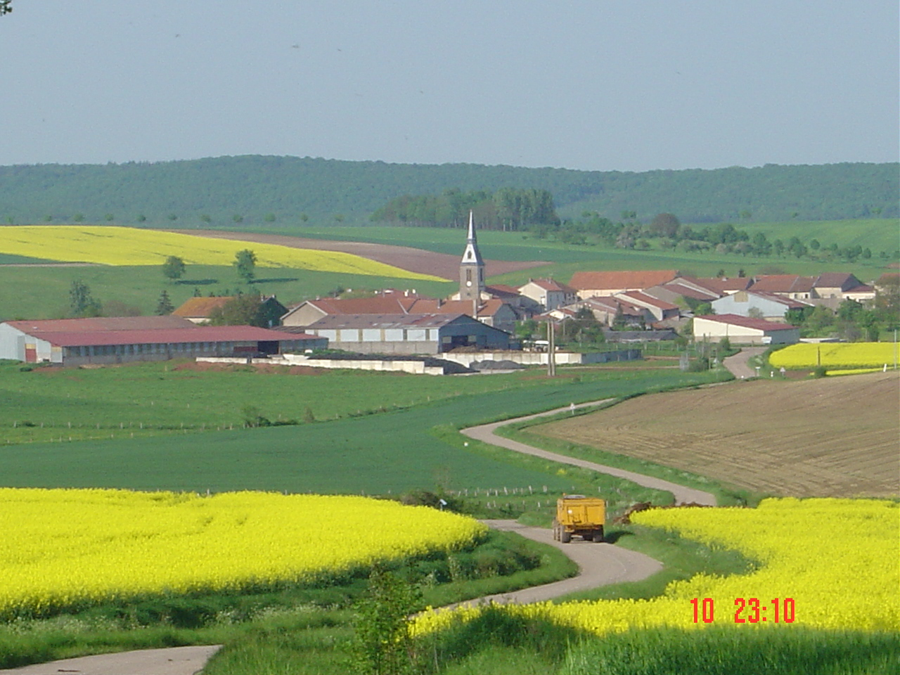 vue du village d'athienville